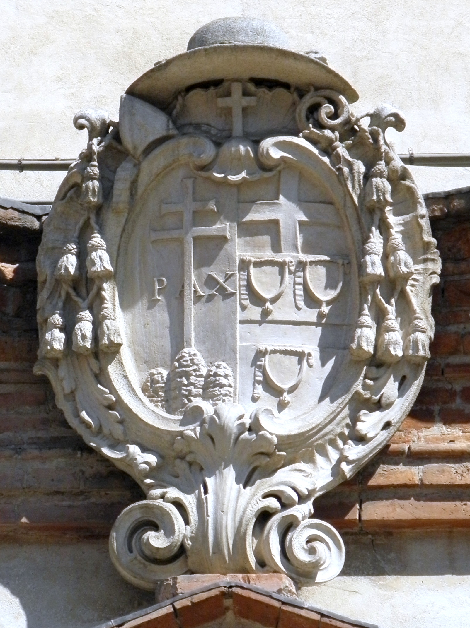 Rovigo: dettaglio dello stemma posto sul timpano della chiesa di Sant'Agostino sita in Via Giacomo Sichirollo.